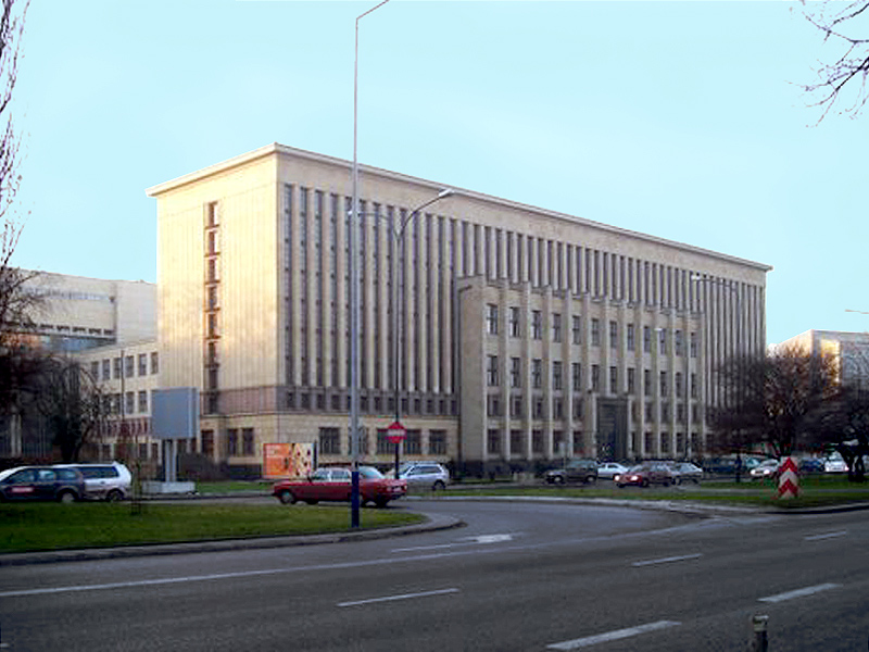 Biblioteka Jagiellońska w Krakowie